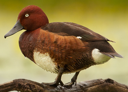 Aythya nyroca - male, Hortobágy, Hungary